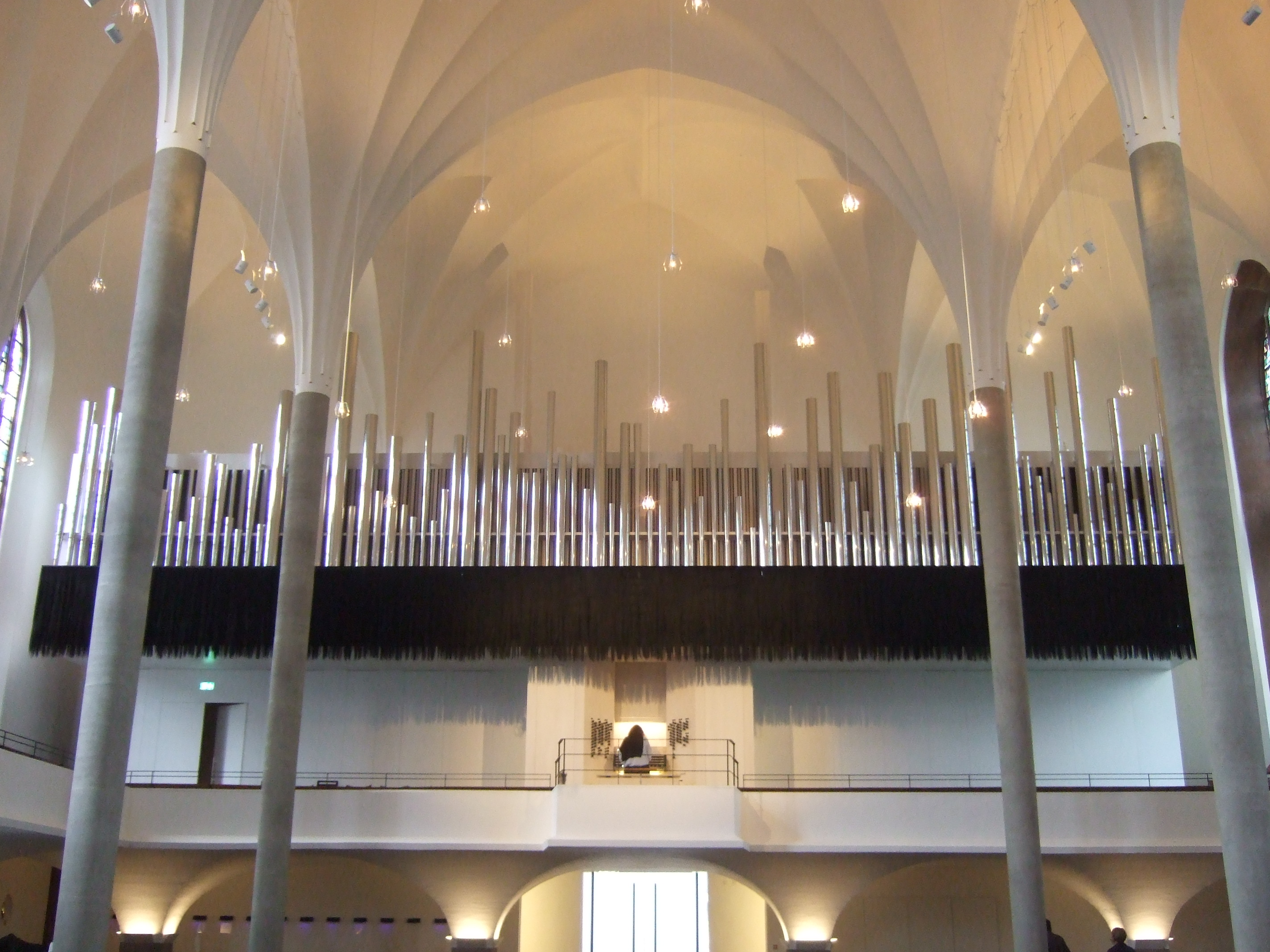 Orgel Martinskirche 2017